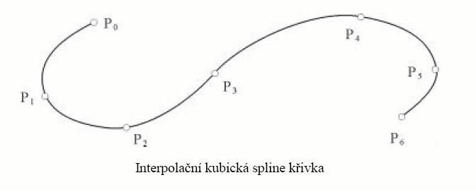 interpolacni kub spline krivka